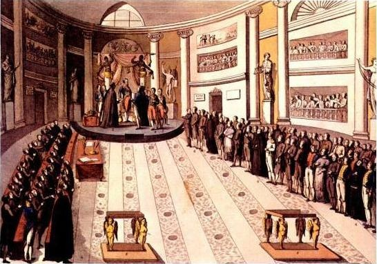 Jura de la Constitución de 1812 por Fernando VII de España en la sesión inaugural de las Cortes del Trienio Liberal el 9 de julio de 1820 (Madrid, palacio de María de Aragón).